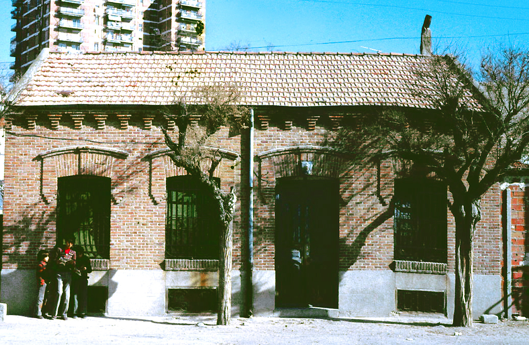 Calle desaparecida en el Barrio Blanco. Madrid (España)